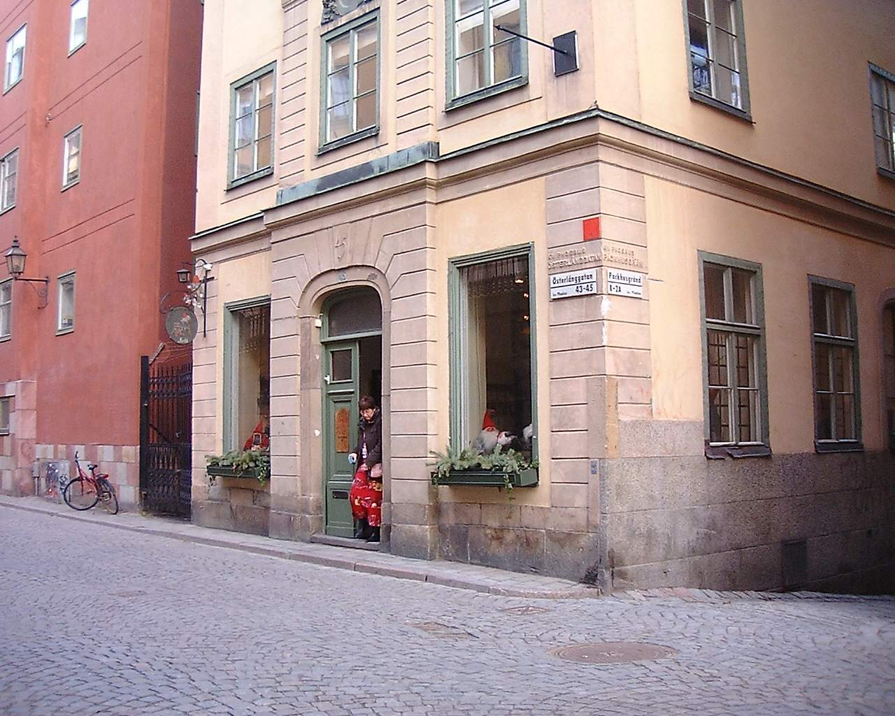 43-45, Österlånggatan, Gamla stan, Stockholm.